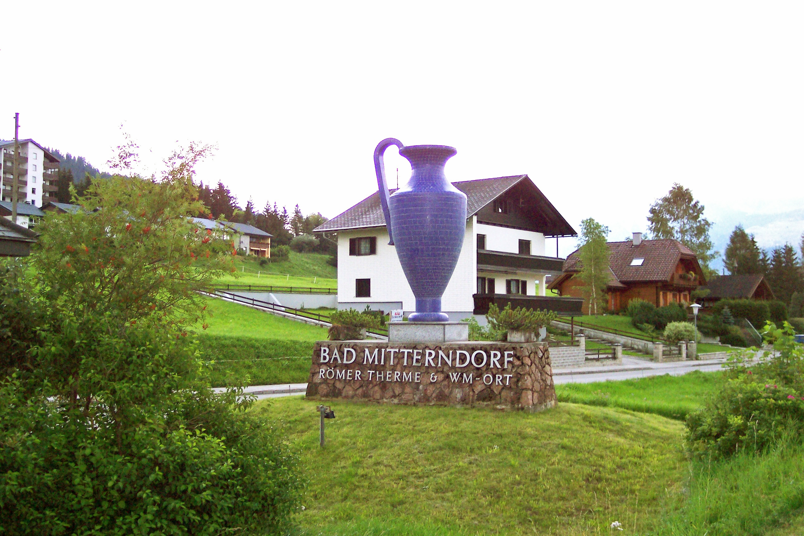 Diese Amphore steht am Ortseingang von Bad Mitterndorf